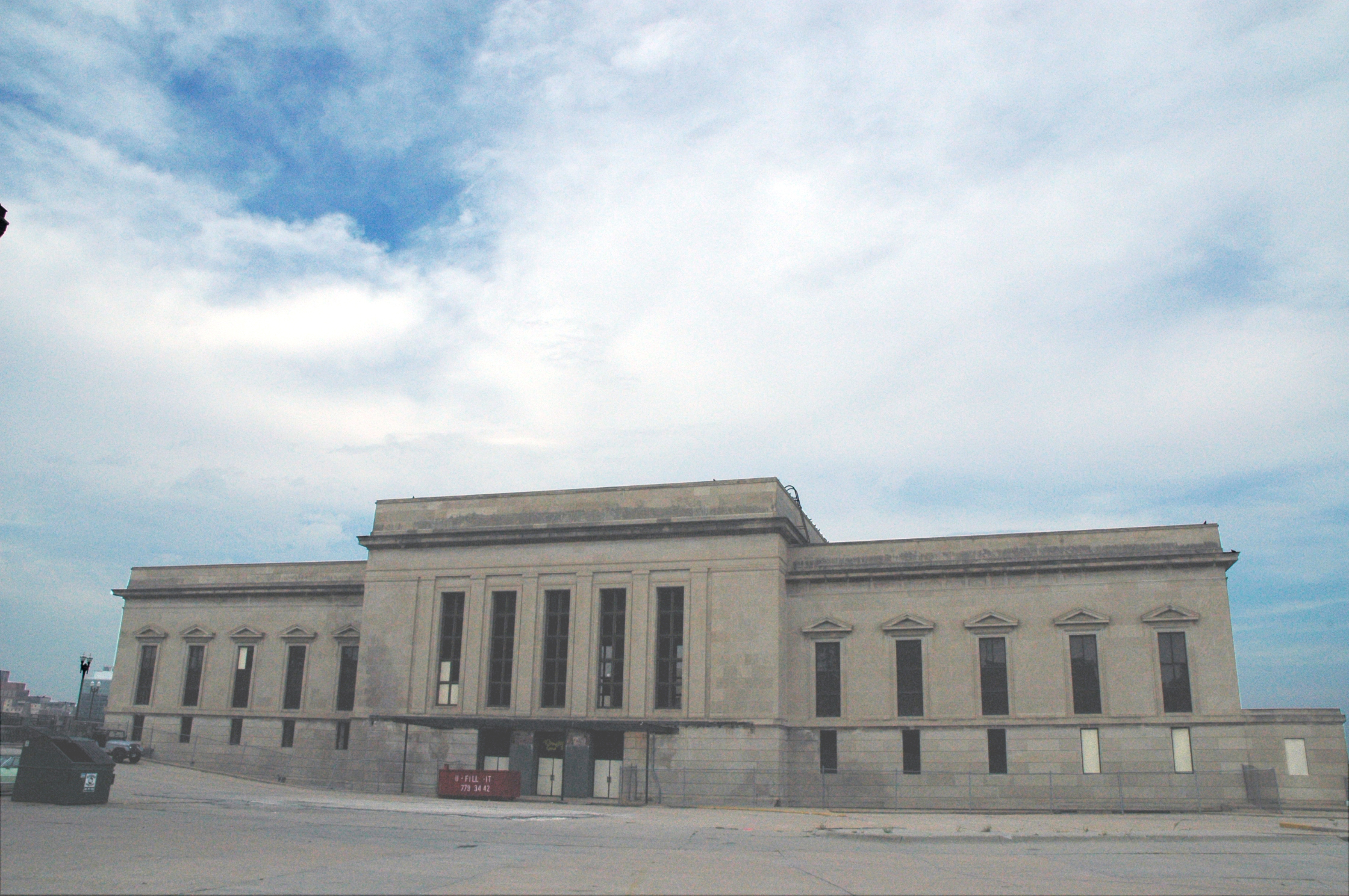 Burlington Station in Omaha, Nebraska.